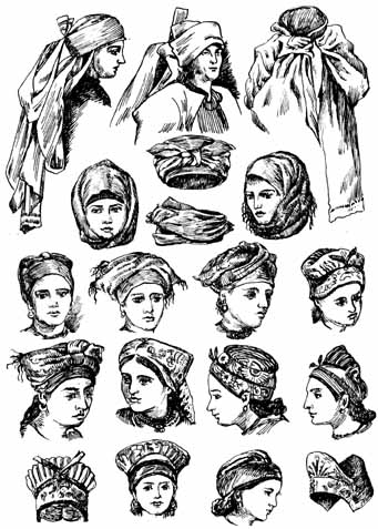 Artwork by Ukrainian artist Opanas Slastion. Жіноче вбрання голови